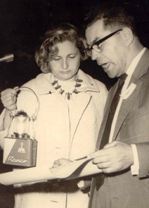 פרדקה מזיא ומשה בייסקי בטקס הנחת אבן הפינה למשואה, 1965